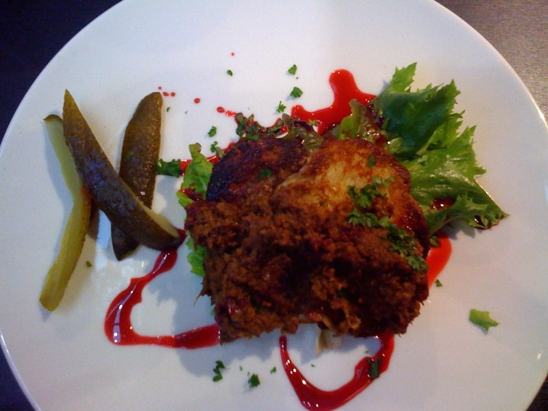 vorschmack